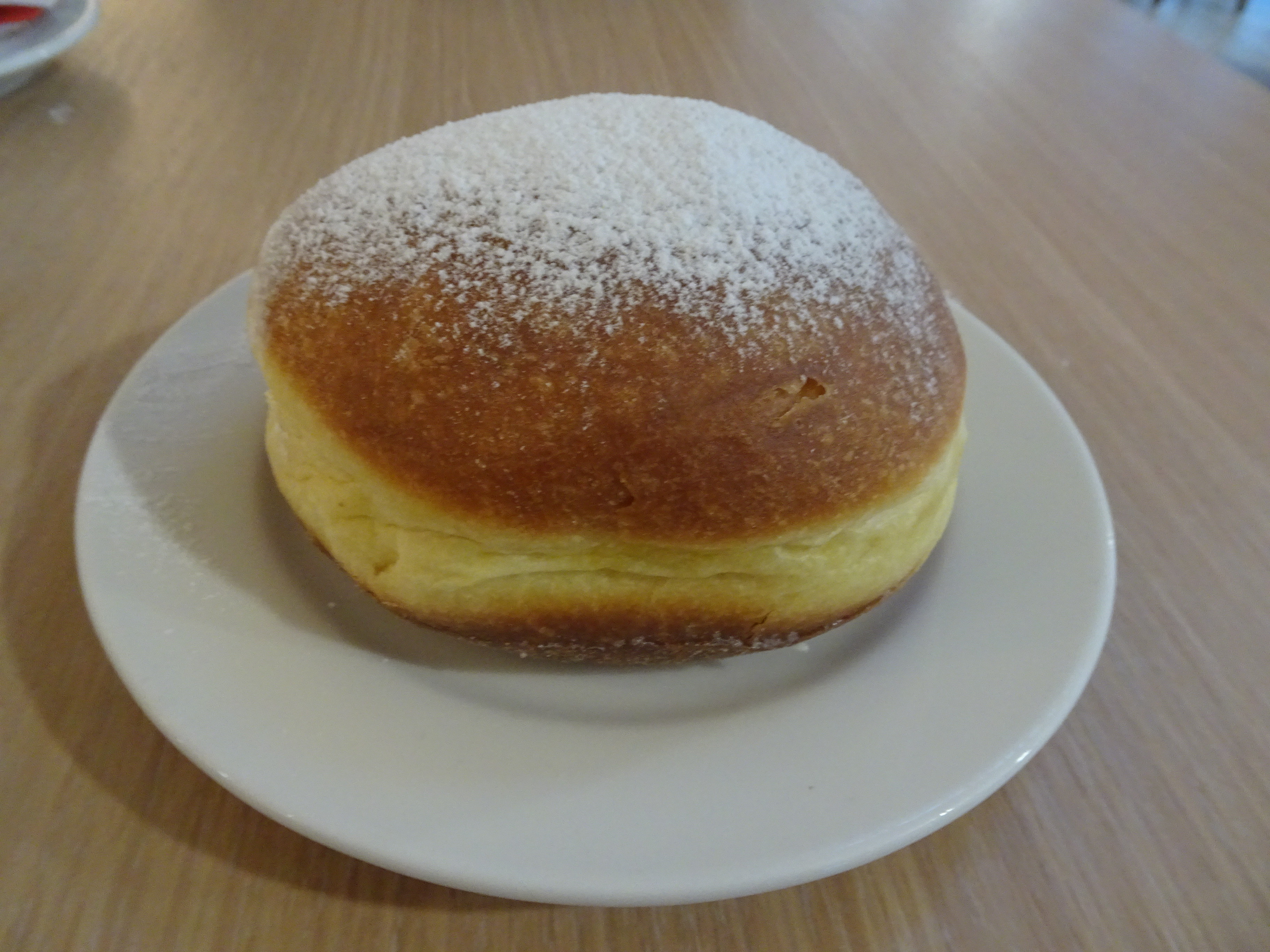 Krof (trojanski)